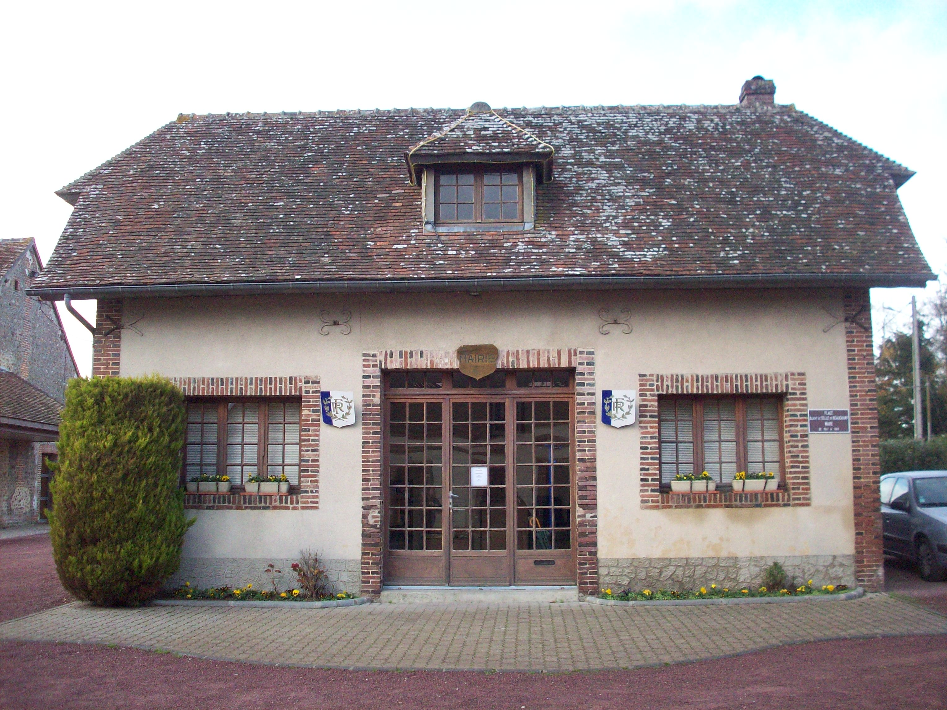 Mairie de Chaise-Dieu-du-Theil.